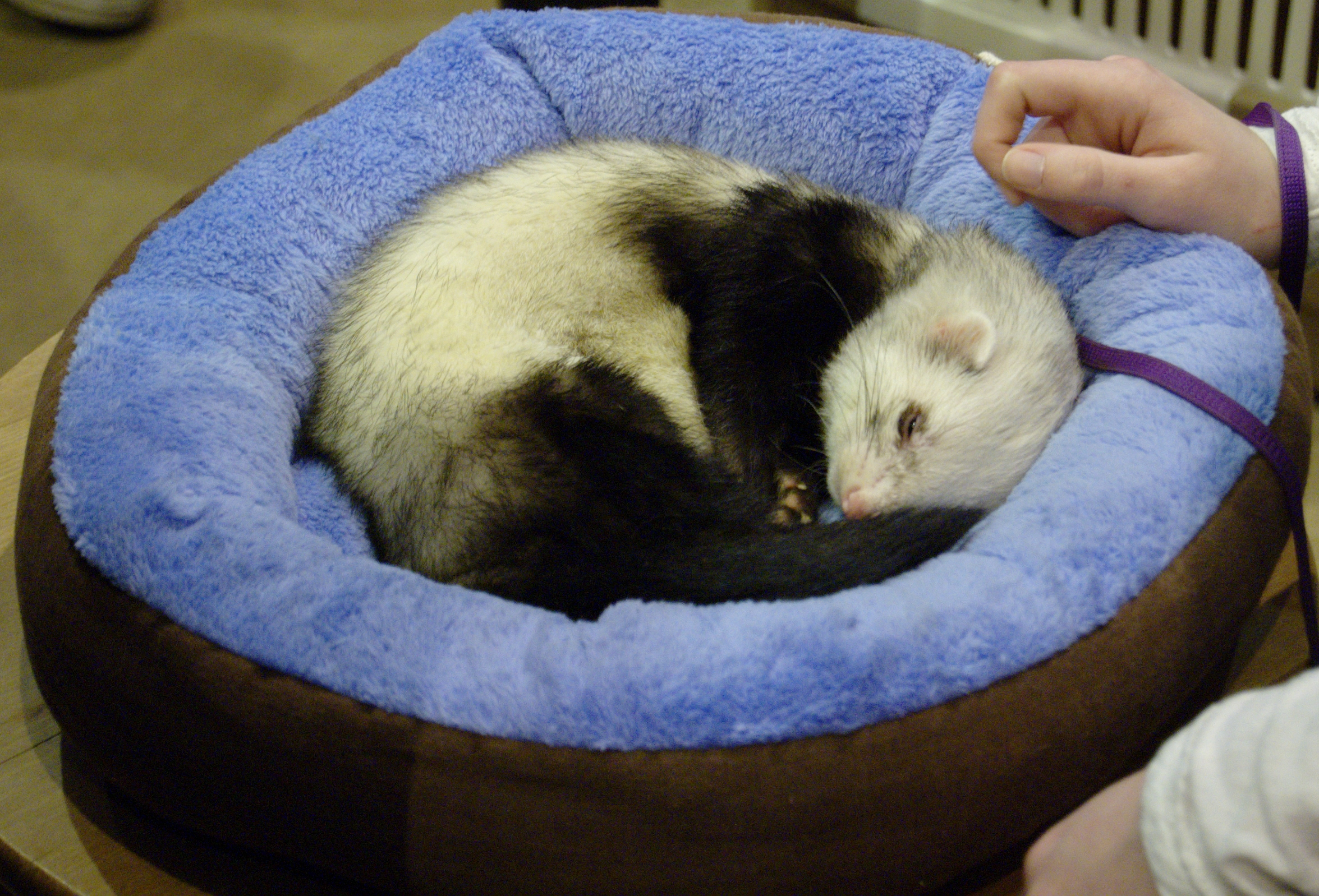 Recentrage de File:Salon agriculture 2009 - furet.jpg pour illustration